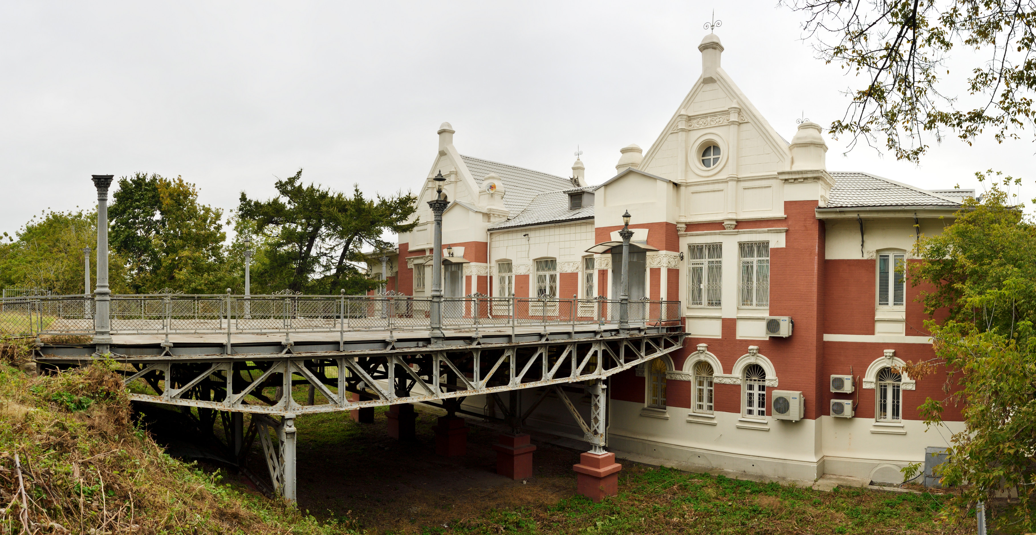 Станция Воробьевы горы: Хамовнический Вал ул., Хамовники, Центральный округ, Москва